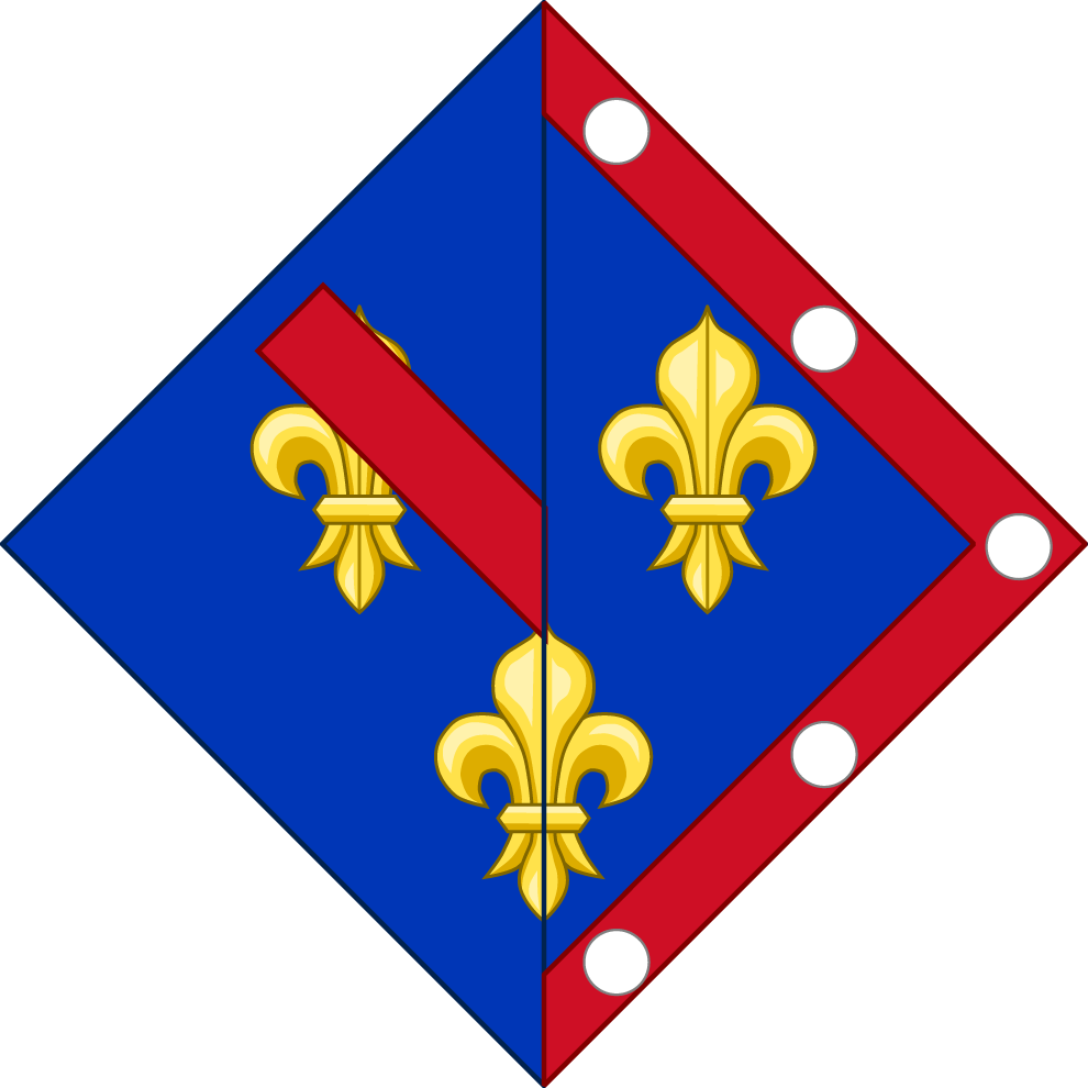 Armes de Françoise d'Alençon, duchesse de Vendôme